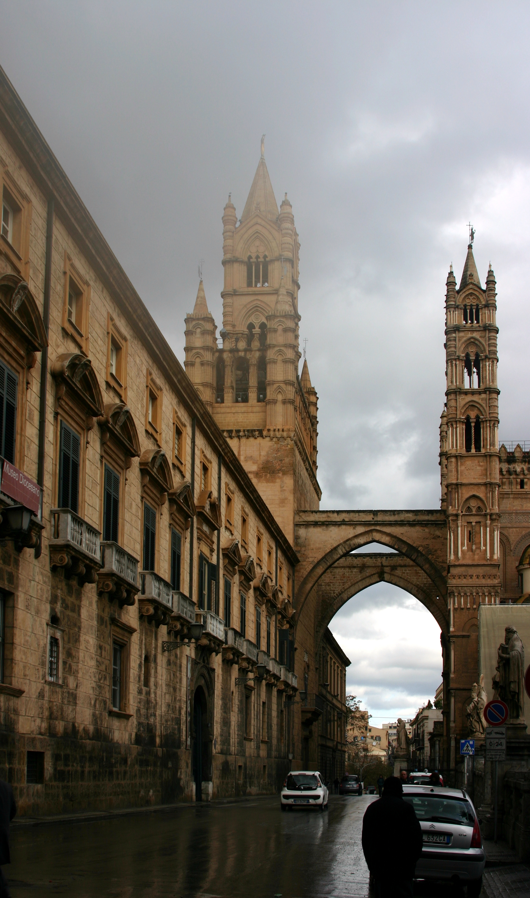 Cathedral of Palermo